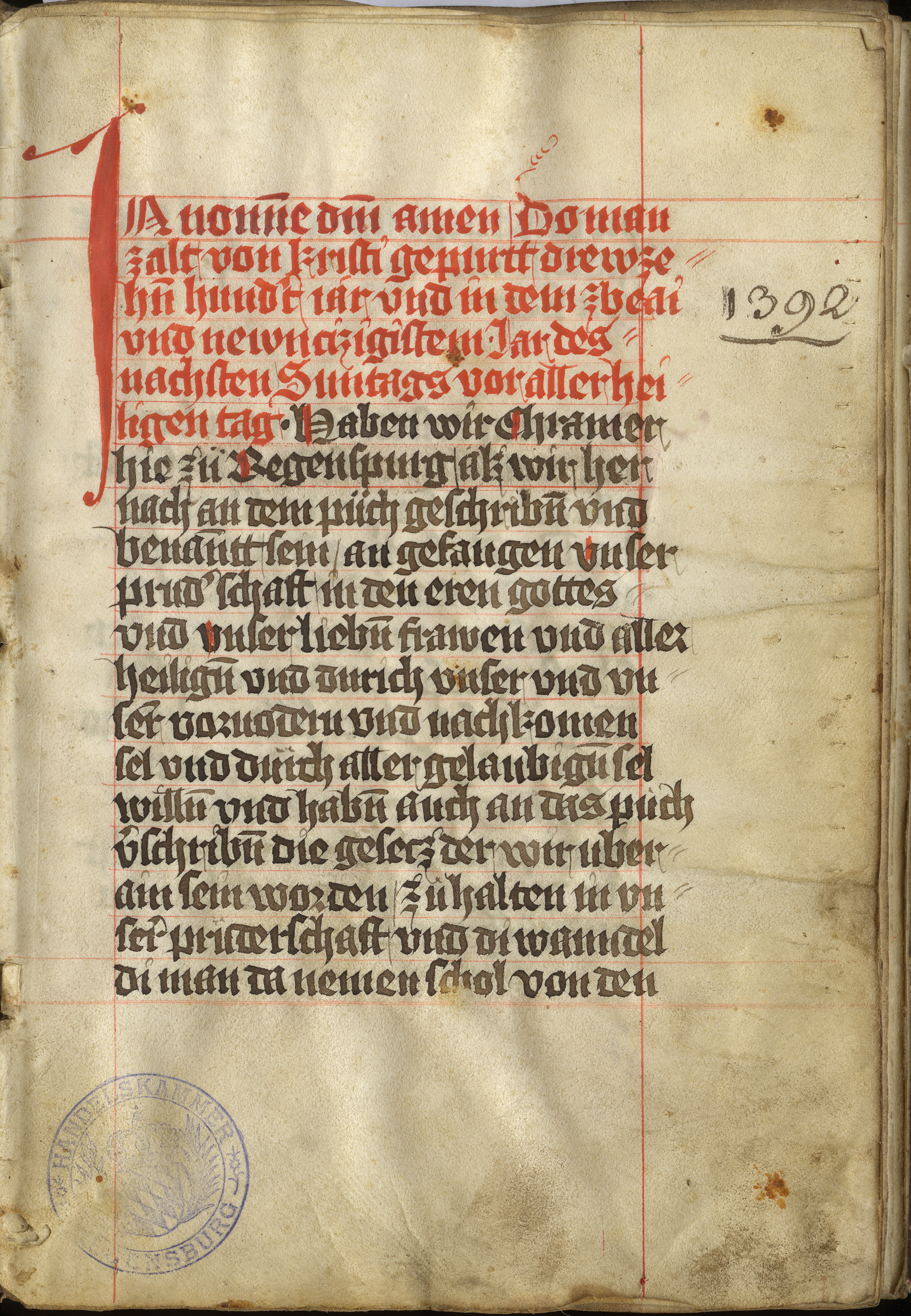 Satzung der Regensburger Kramerinnung 1392